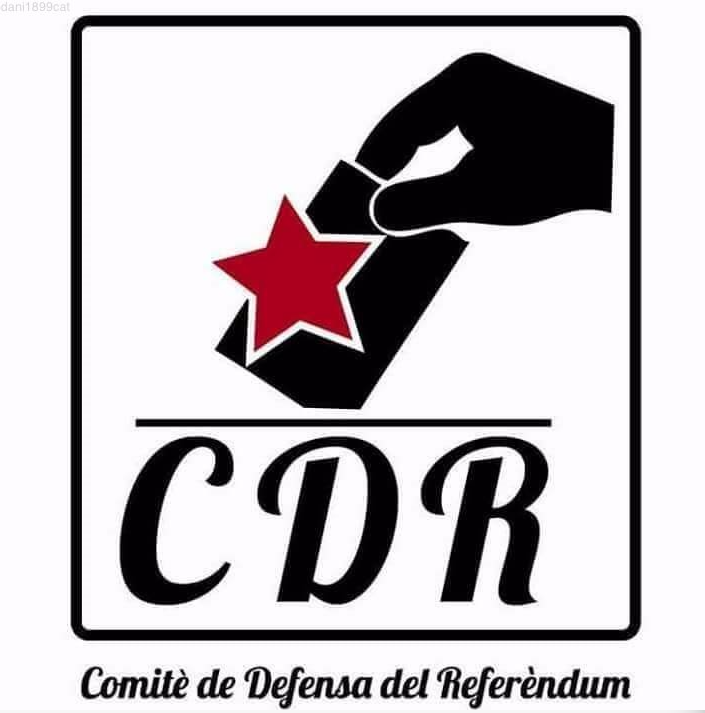 Erkennungszeichen des Komitees zur Verteidigung der Republik